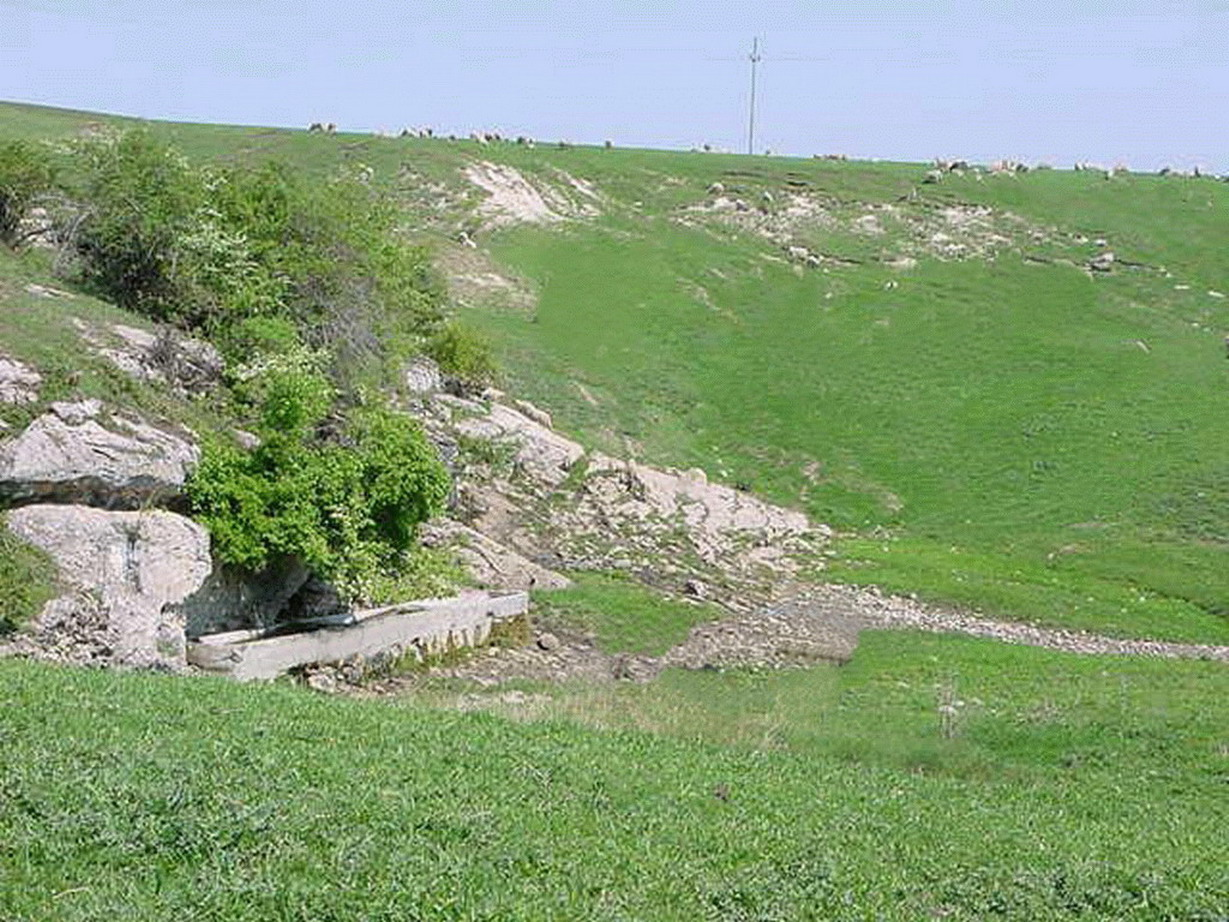 România, Copăceni, comuna Sănduleşti, judeţul Cluj, "Izvorul Romanilor"